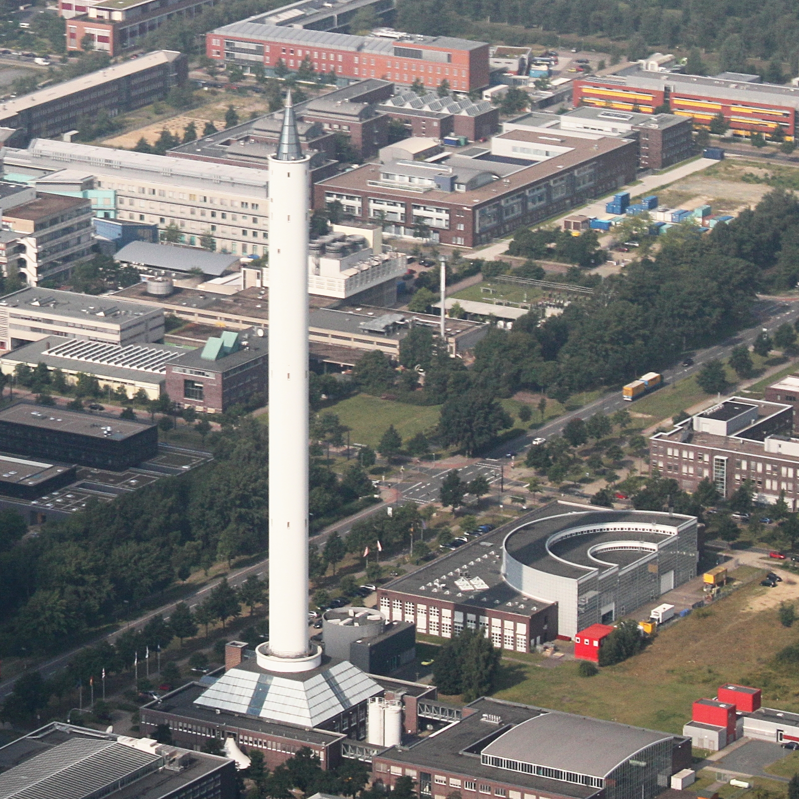 Luftaufnahme Bremen; entlang der A27; Uni Bremen; Flughöhe 500 m